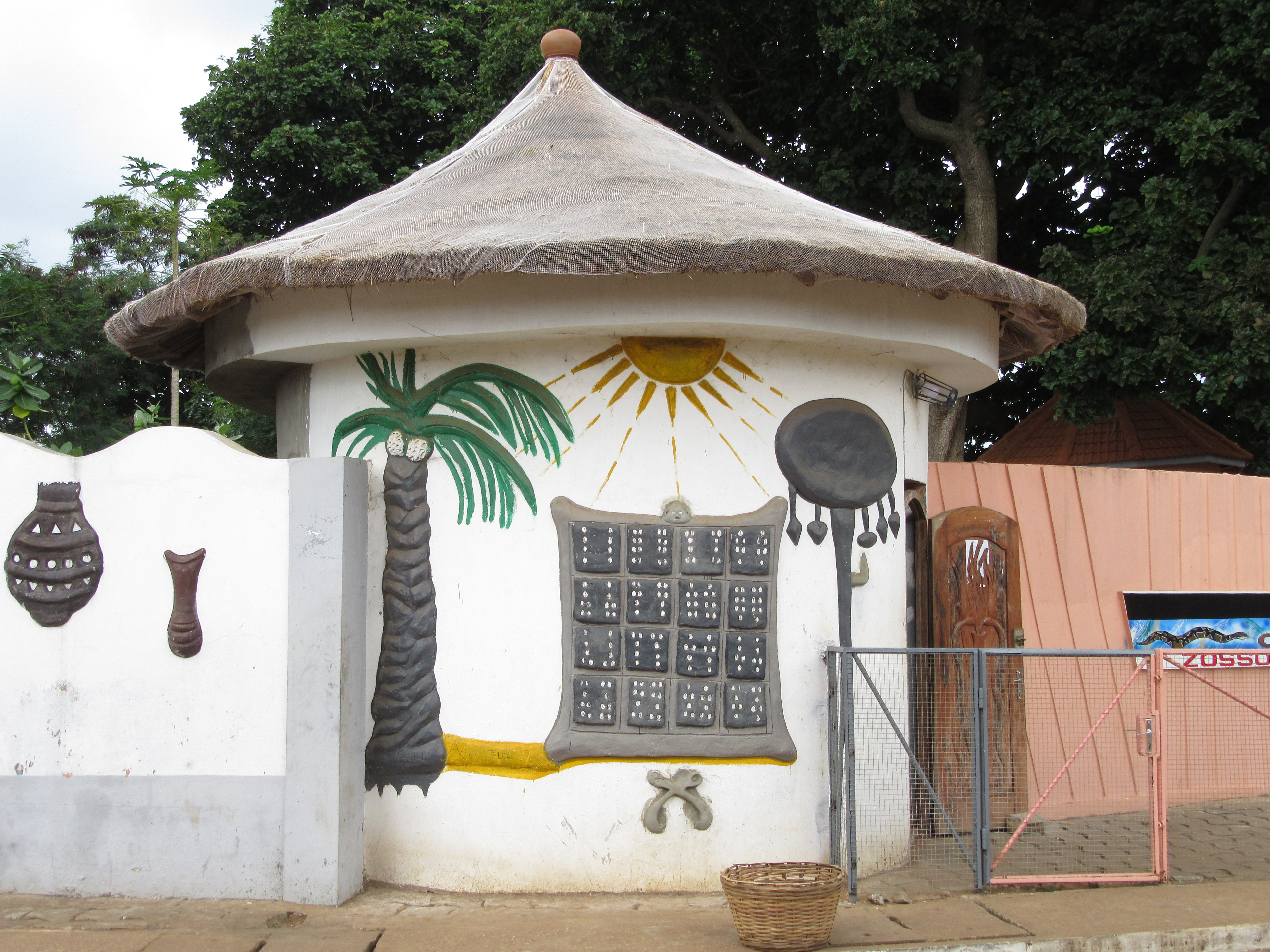 Temple des Pythons Le temple de Dangbé est consacré au culte du python dont des dizaines de spécimens se prélassent dans l'une des petites cases. Si vous voulez avoir un python autour du cou, le guide se fera un plaisir de vous le passer, moyennant un petit billet. Sinon il vous parlera du python, dieu vaudou vénéré jusqu'à Grand-Popo, où sa représentation orne de nombreux temples. A Ouidah, les familles xweda et fon qui pratiquent le culte du python Dangbè (dit aussi Dan) se distinguent par des scarifications symbolisant les marques frontales du python. Wikidata has entry Q36698317 with data related to this item.